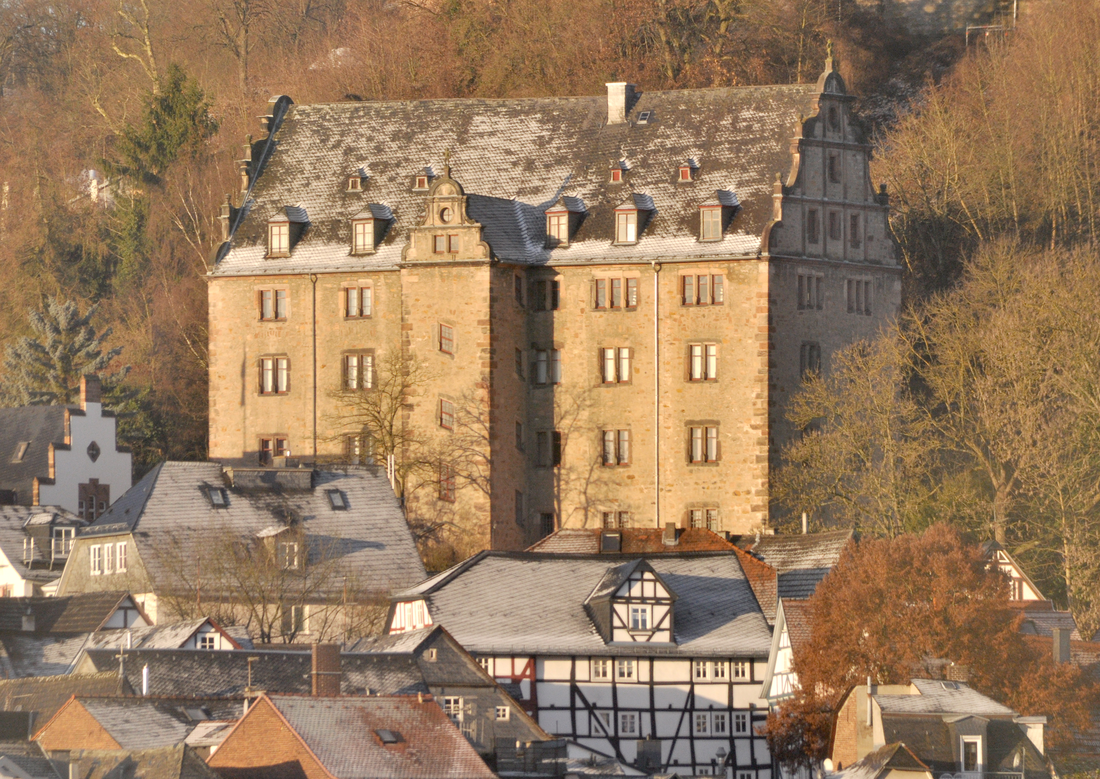 Ehemalige landgräfliche Kanzlei ("Neue Kanzlei") in Marburg, erbaut 1573-75 von Ebert Baldewein im Auftrag von Landgraf Ludwig IV, seit 1927 Religionskundliche Sammlung der Universität. Ansicht von Osten.